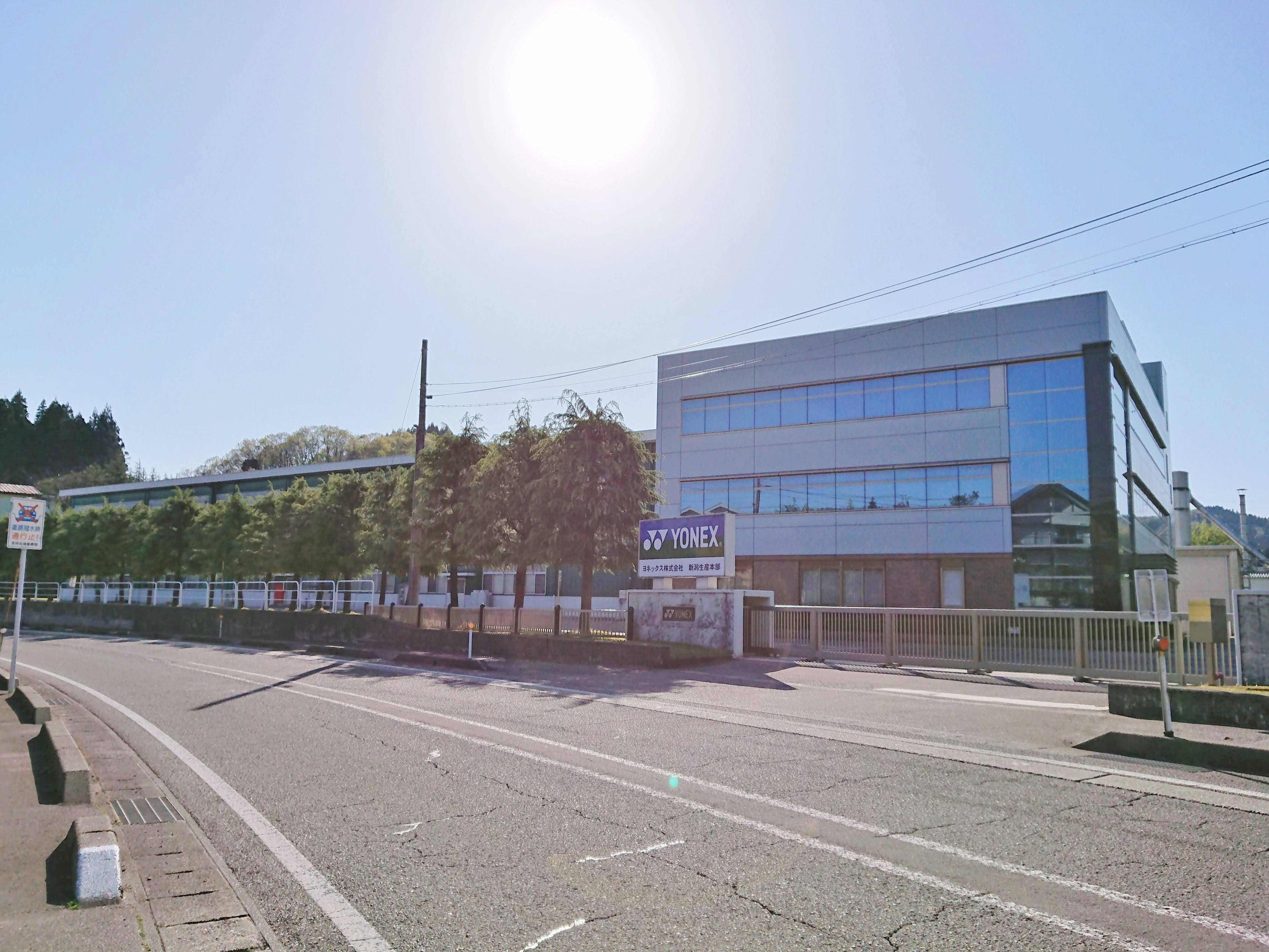 ヨネックスの旧本社